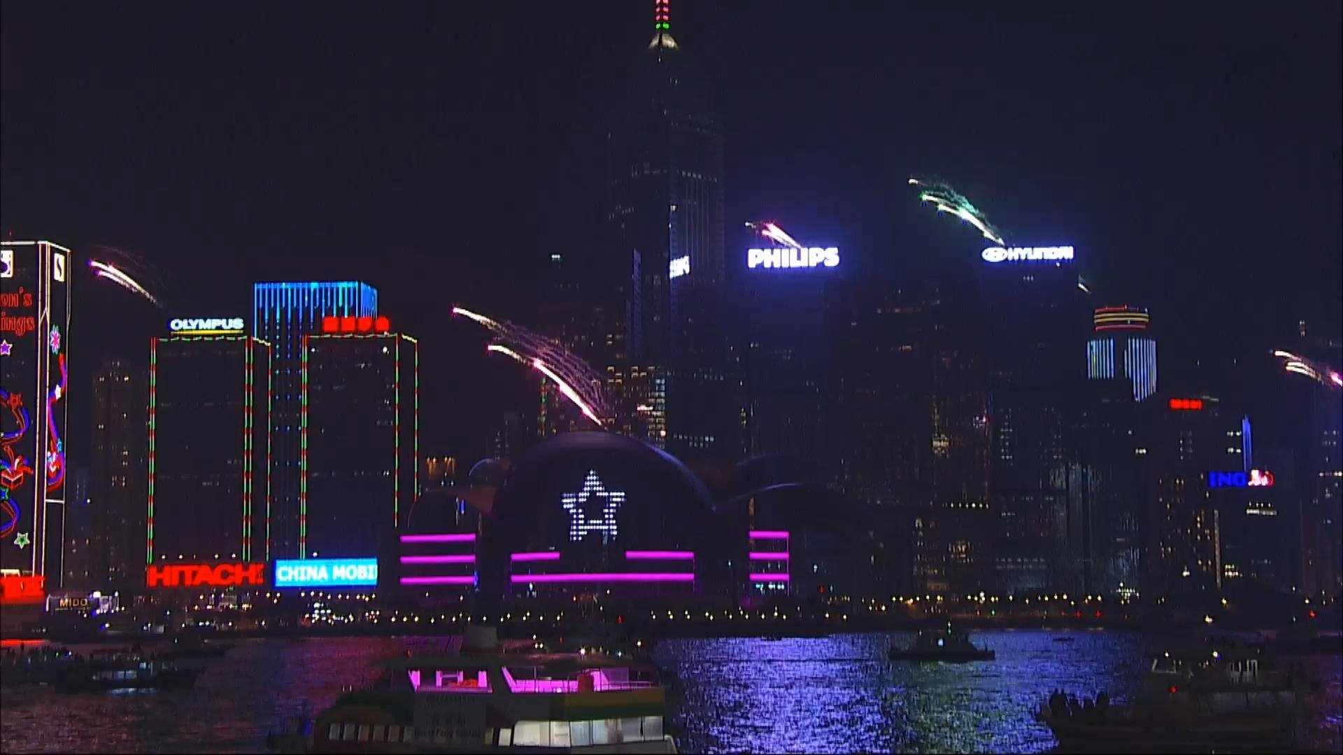 中文（香港）: 於「新年．新世界．香港除夕倒數」中，發放代表愛的「流星煙火」。攝於2012年12月31日。